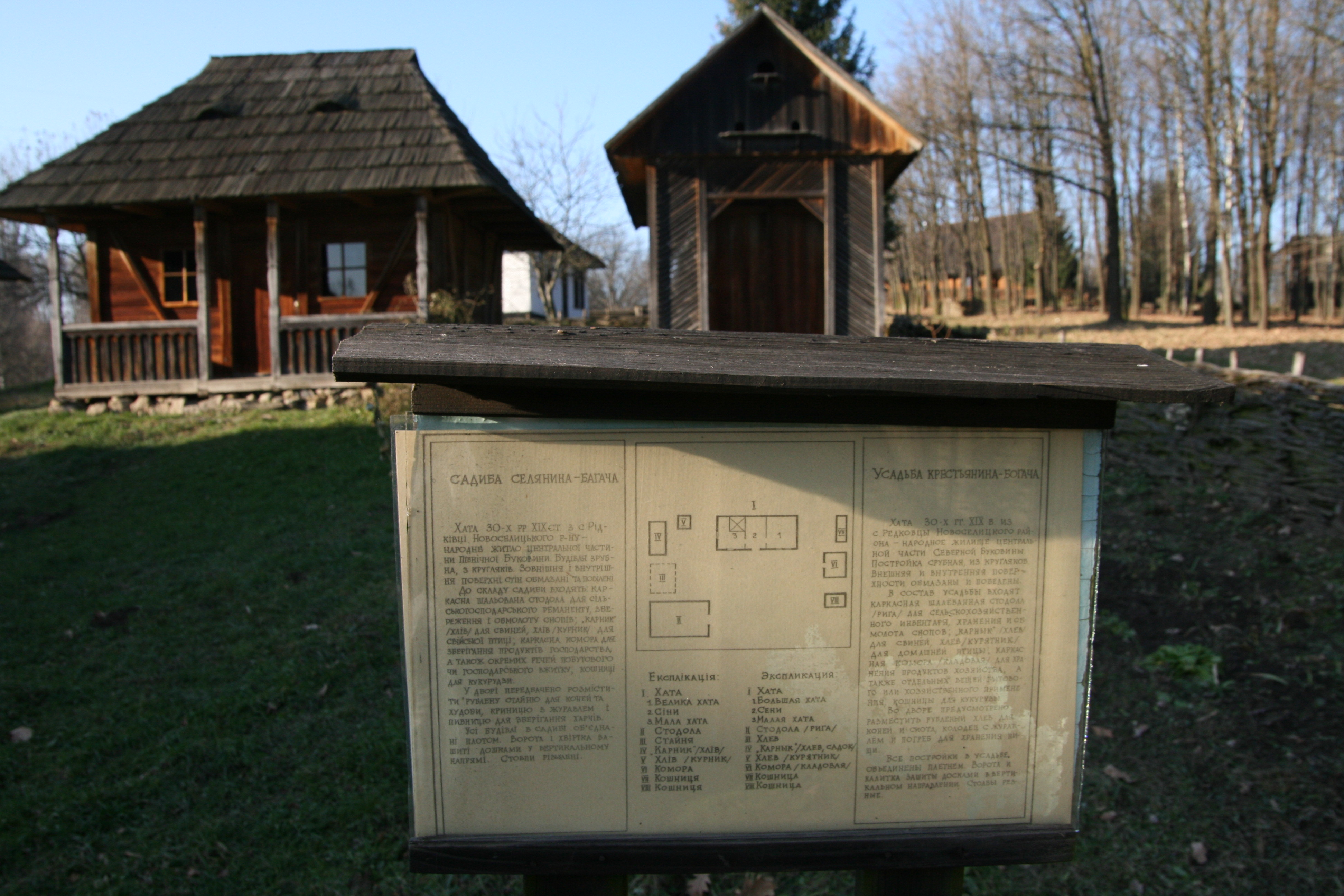 Комплекс Чернiвецького музею народної архiтектури та побуту (мур.), Чернівці, вул. Московської Олiмпiади